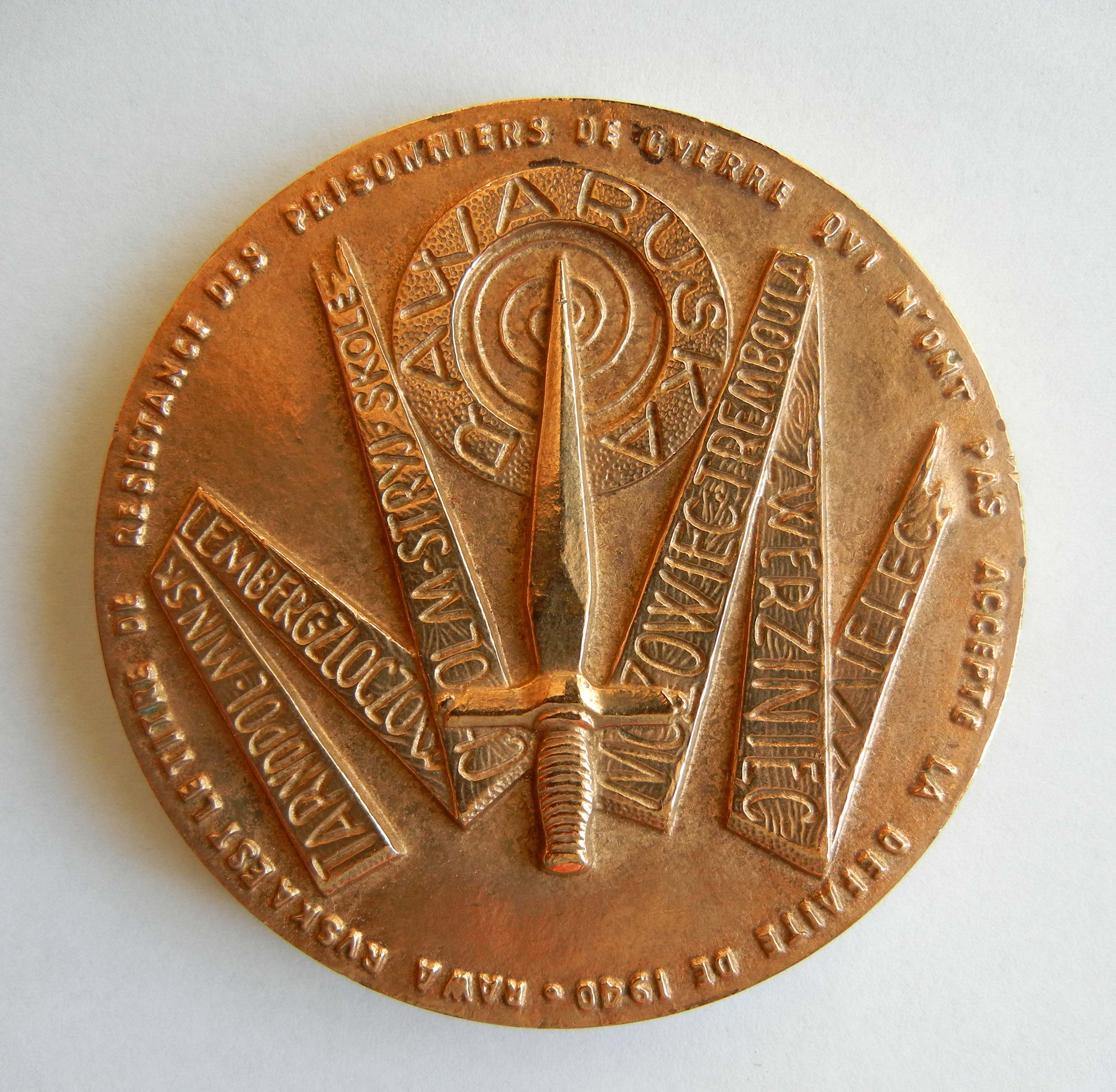 A CEUX DE RAWA RUSKA 1942 – 1962 Rawa Ruska est le titre de résistance des prisonniers de guerre qui n'ont pas accepté la défaite de 1940. Tarnoplo (Ternopil) – Minsk – Cholm (Chełm) – Stryj (Stryï) – Skole – Mozowiec (Grodzisk Mazowiecki ou Tomaszów Mazowiecki ?) – Tremboula (?) – Zwerziniec (Zwierzyniec) - Mielec Graveur inconnu en bronze Diamètre 68 mm Poids 154 grs